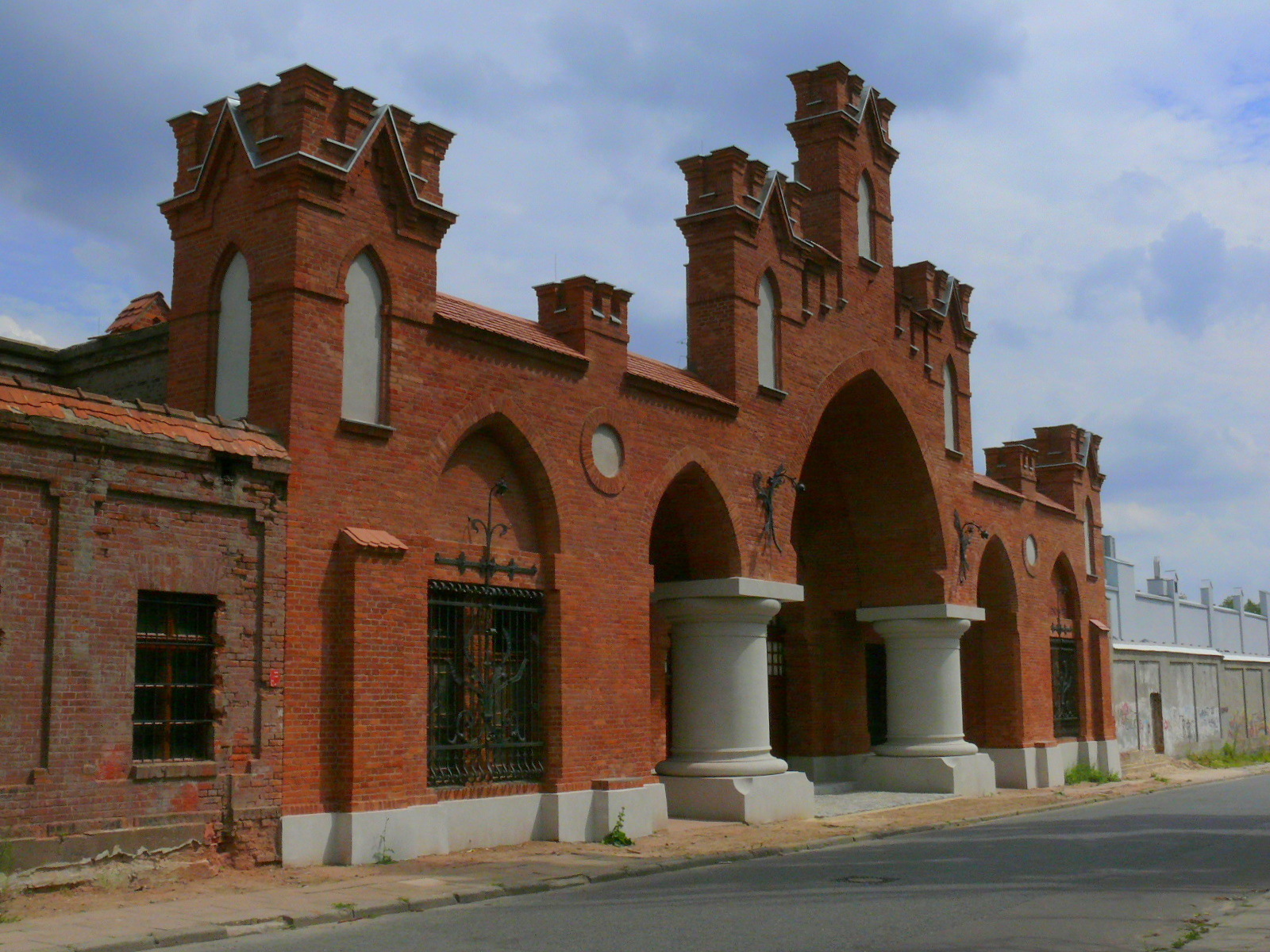 Beczki Grohmana po renowacji